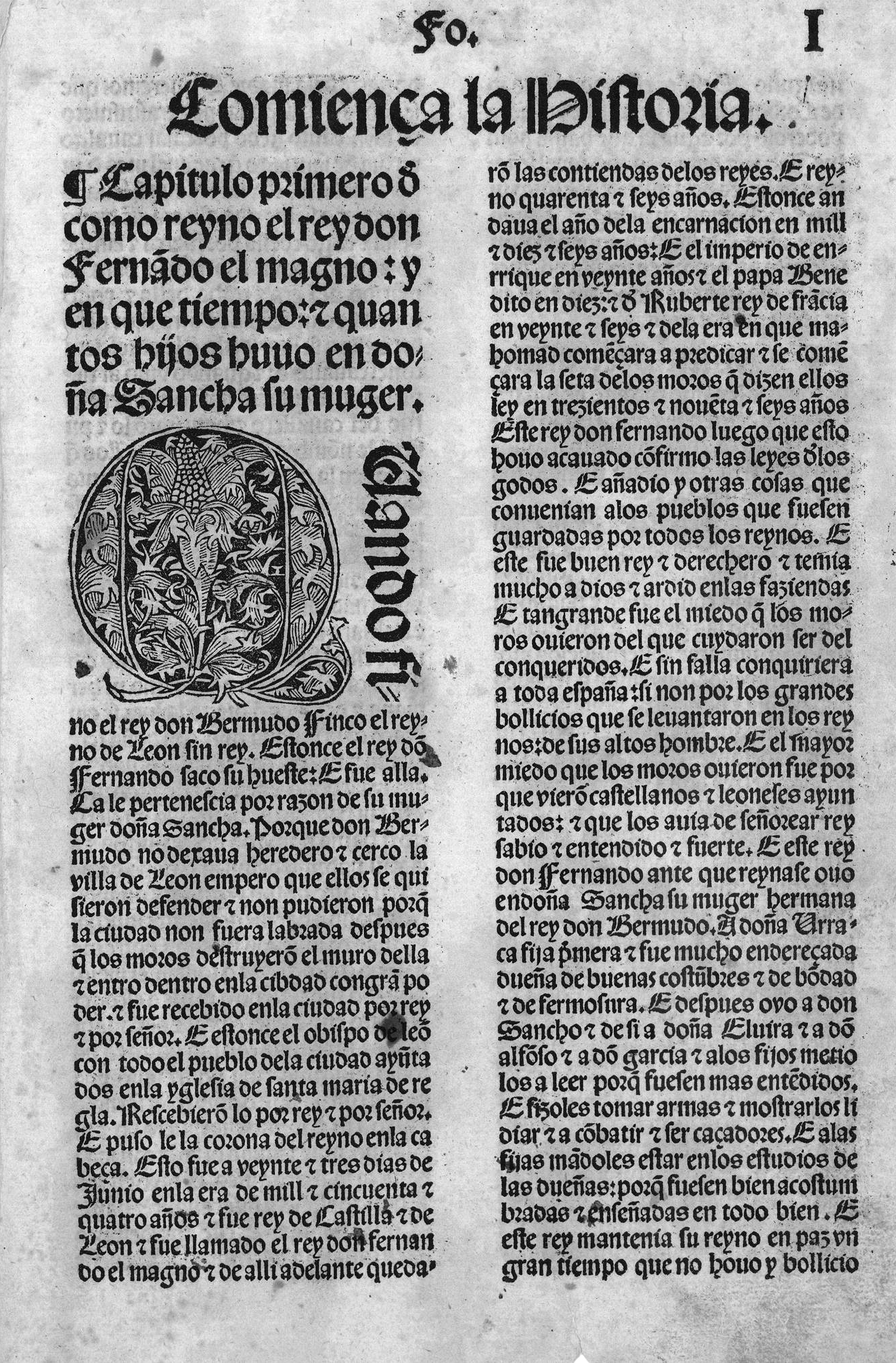 Folio 1r de la Crónica del famoso caballero Cid Ruy Díez Campeador, Burgos, Fadrique Alemán de Basilea; abad Juan López de Belorado y monjes del monasterio de San Pedro de Cardeña, 1512